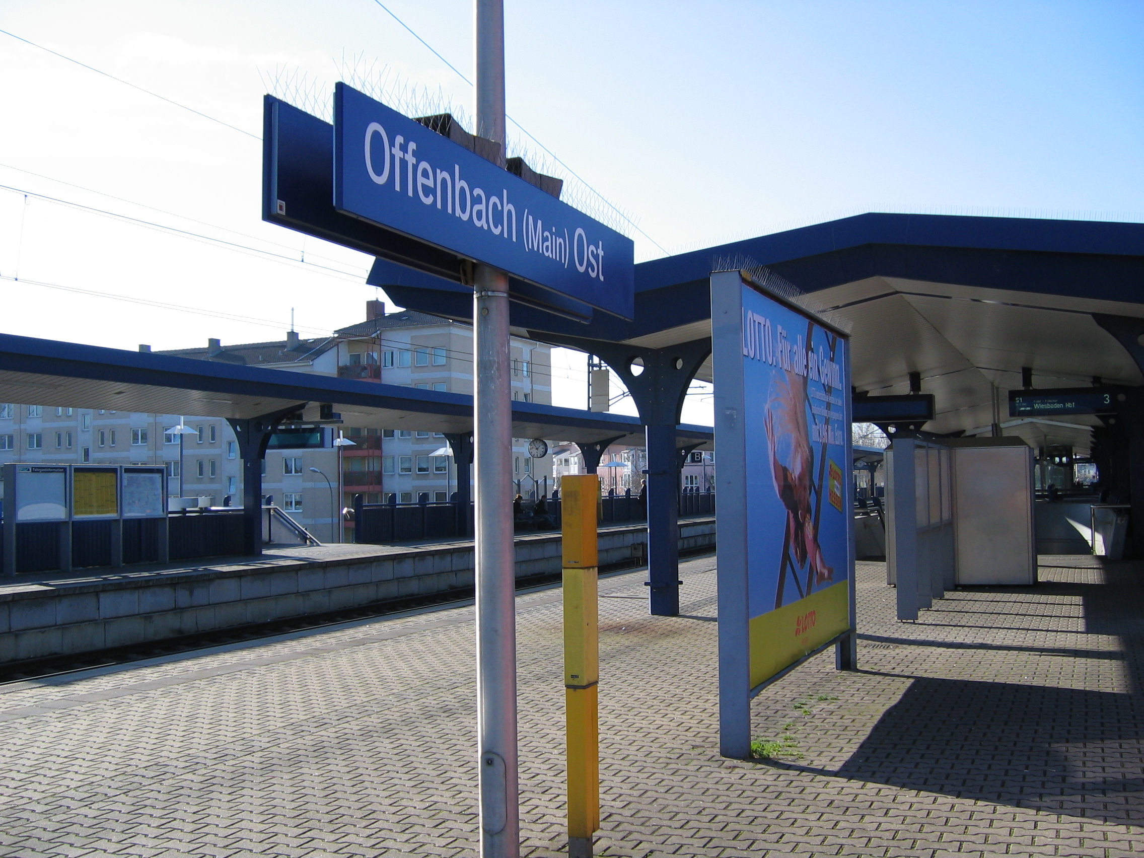 Station Offenbach am Main-Ost / Bahnhof Offenbach-Ost